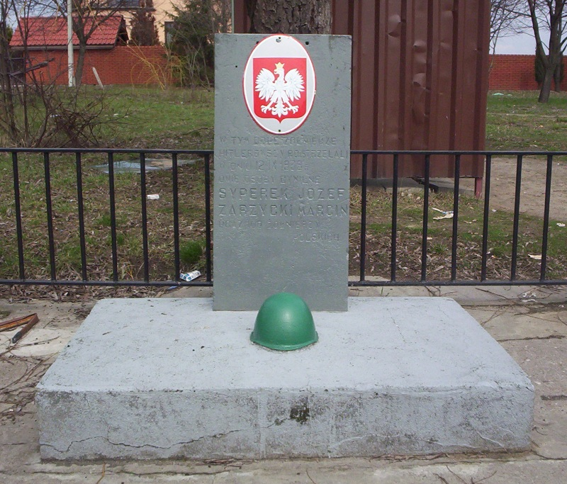 Pomnik w Parzniewie. Napis na nim głosi: W tym dole żołnierze hitlerowscy rozstrzelali w dniu 12 IX 1939 r. dwie osoby cywilne: Syperek Józef, Zarzycki Marcin, oraz 100 żołnierzy polskich.